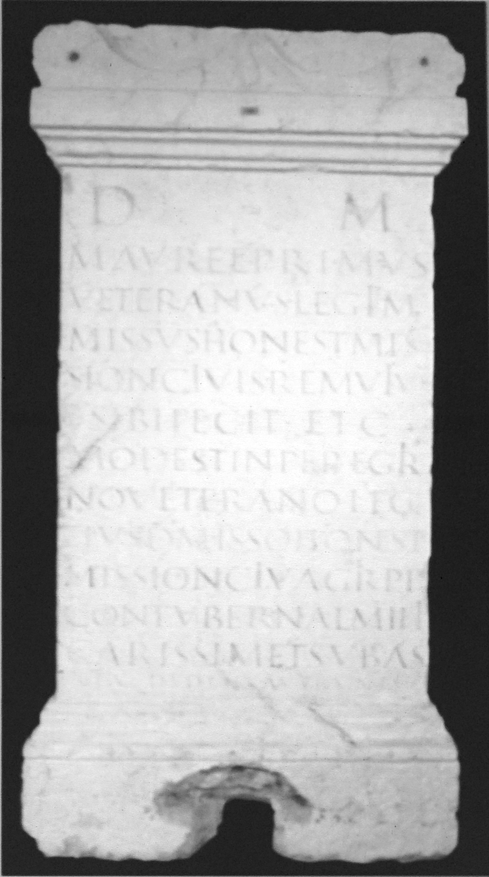 Stèle funéraire présentée au musée de Lyon de citoyens rèmes, vétérans de la Legio I Minervia. Datation entre 200 et 250